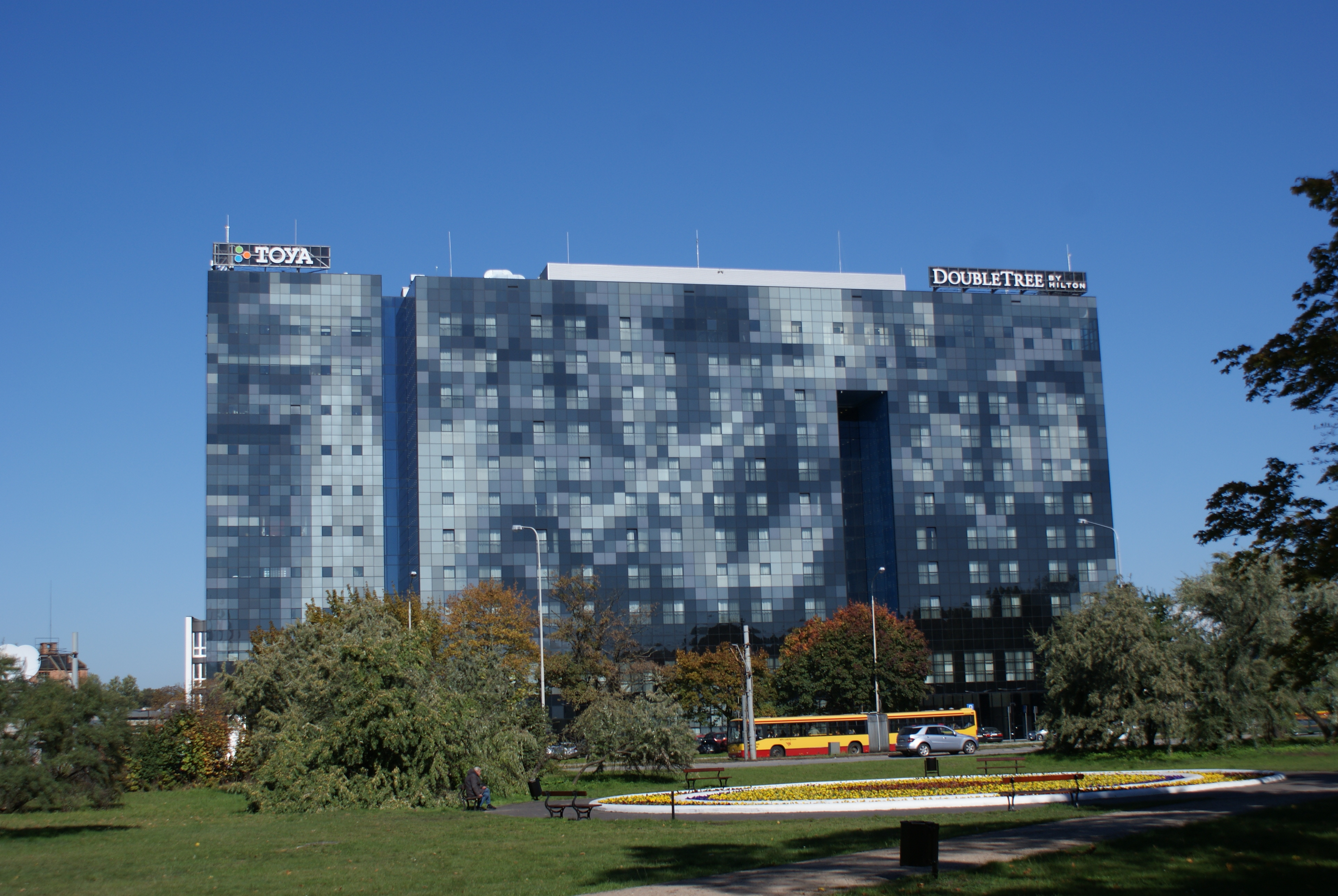 Zdjęcie hotelu DoubleTree by Hilton w Łoidz